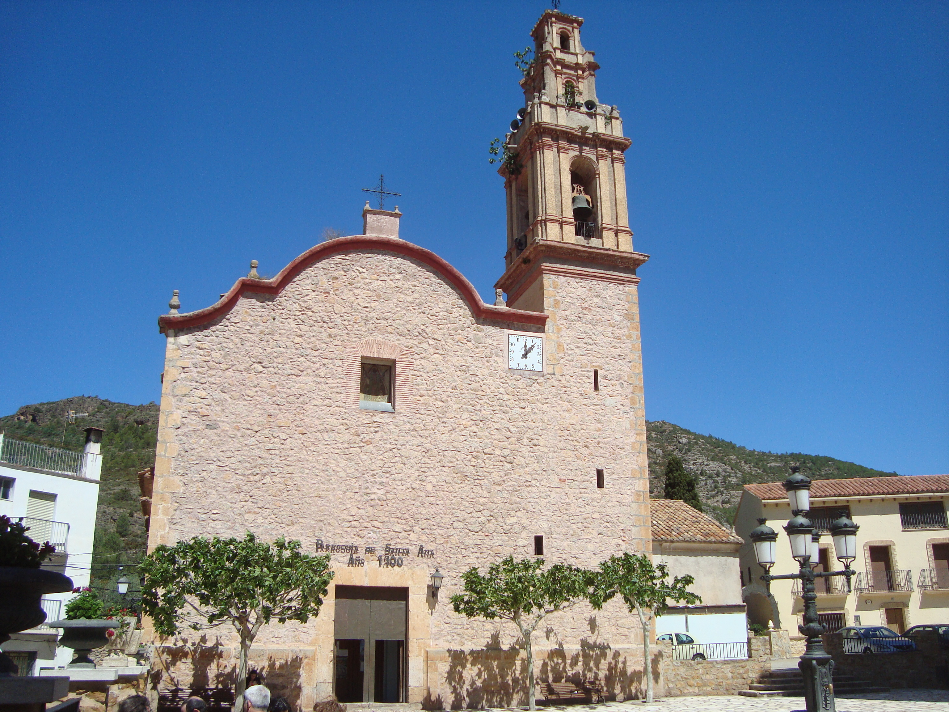 Església parroquial de Santa Anna (Argeleta) 08.015-003.